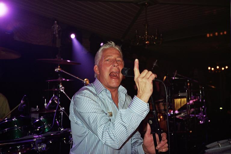 Piet Schilder, Nederlandse Zanger